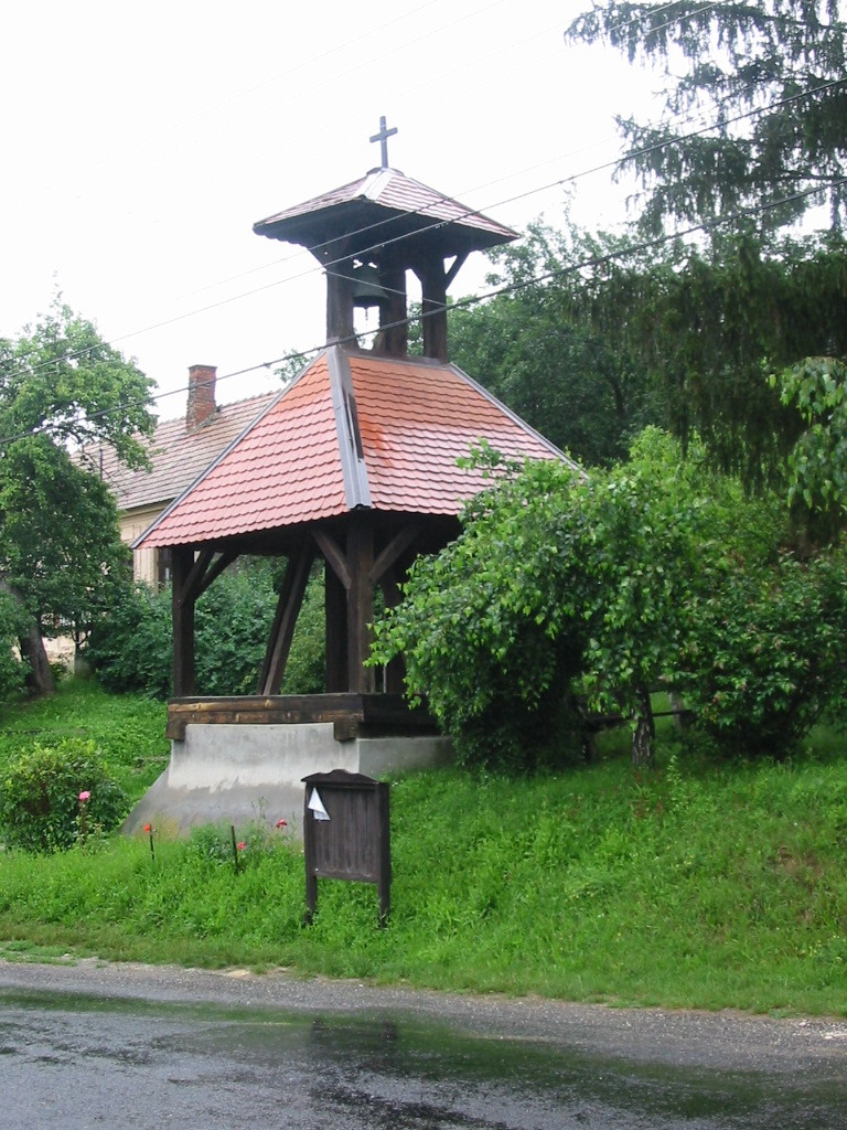 Harangláb